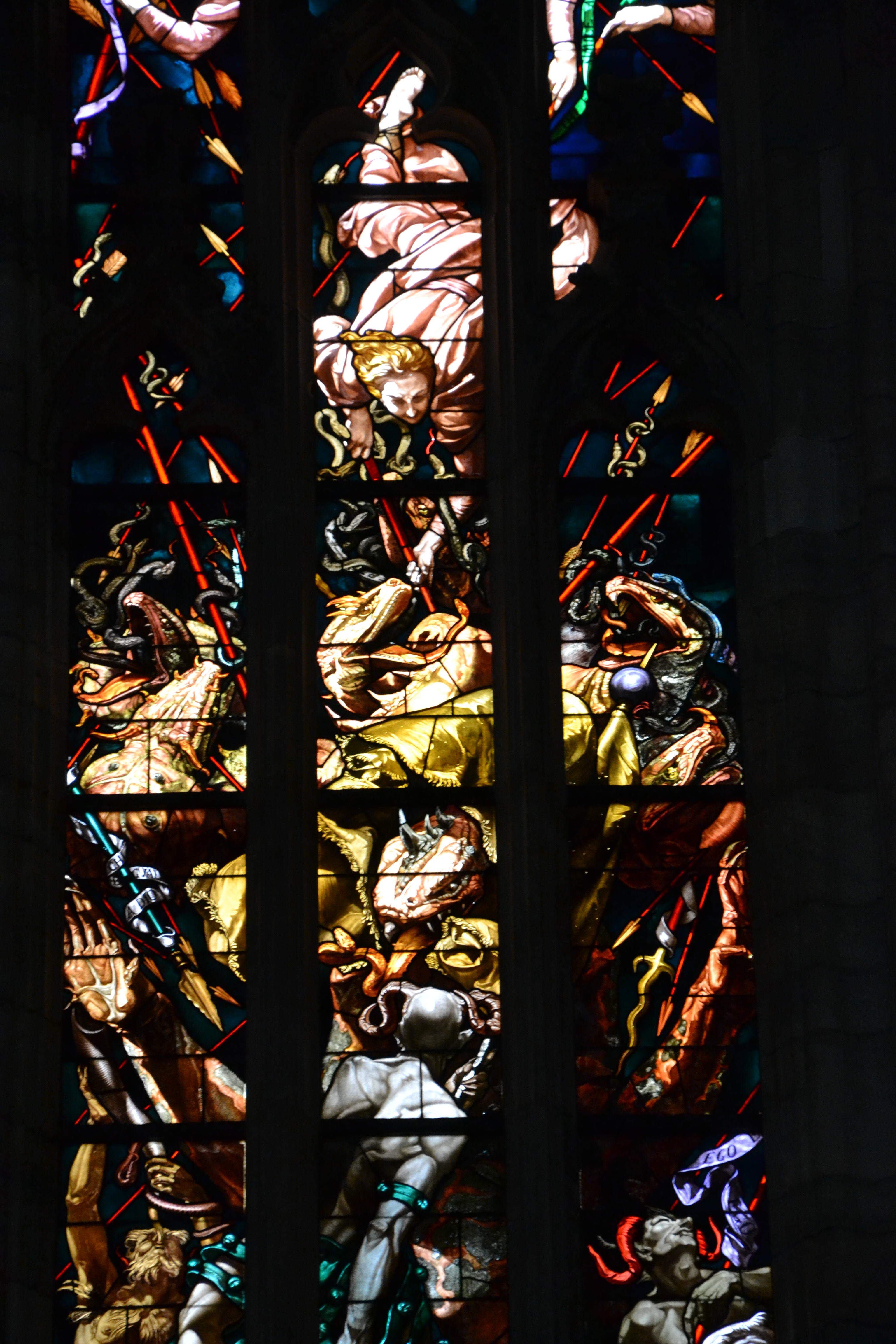 Milano, Duomo, Vetrata di san Michele Arcangelo di Giovanni Domenico Buffa (1939), navata sinistra, XX secolo